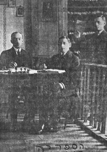 הספריה